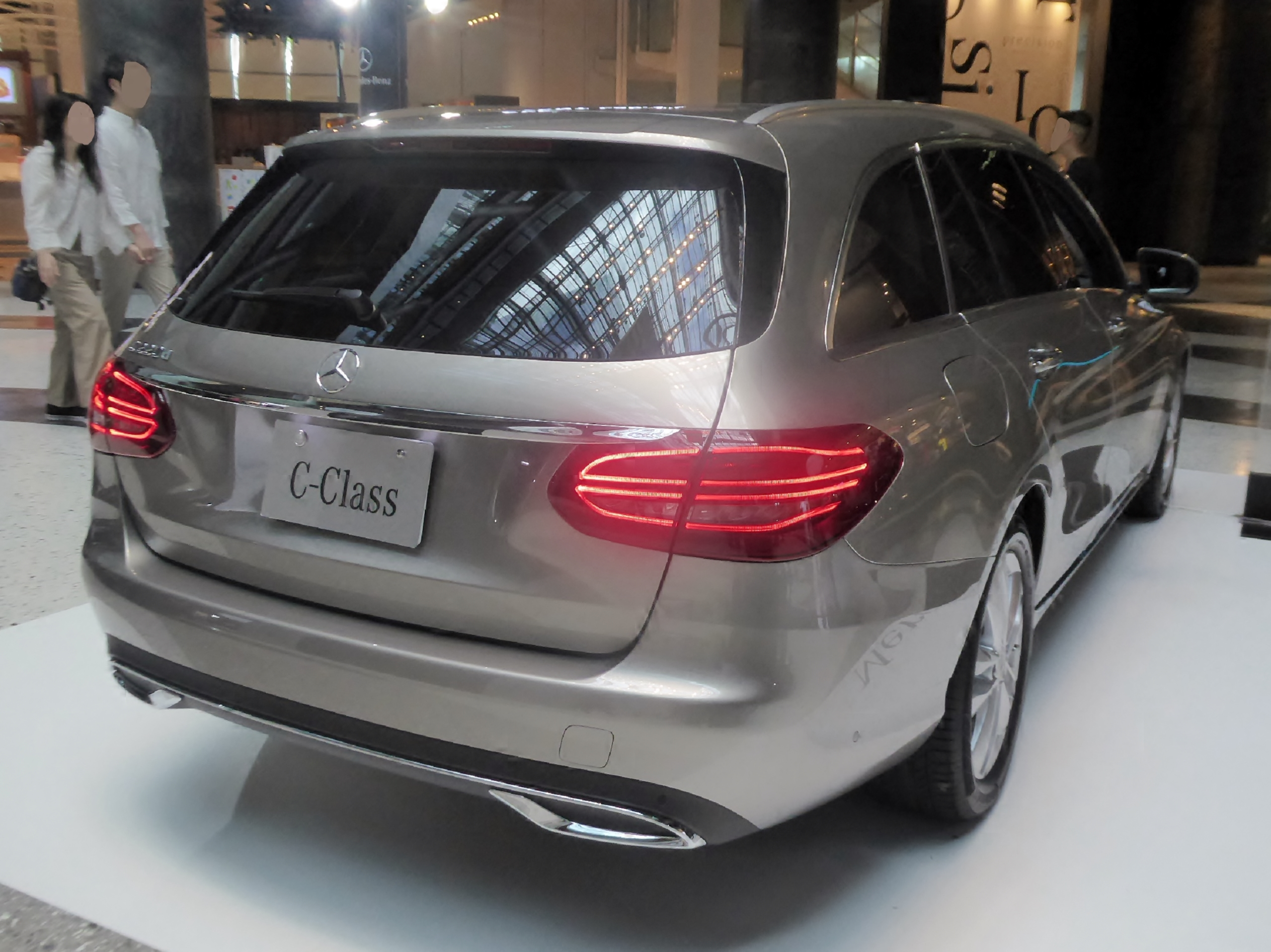 S205系メルセデス・ベンツ・C220dステーションワゴンアバンギャルドをリアから撮影。